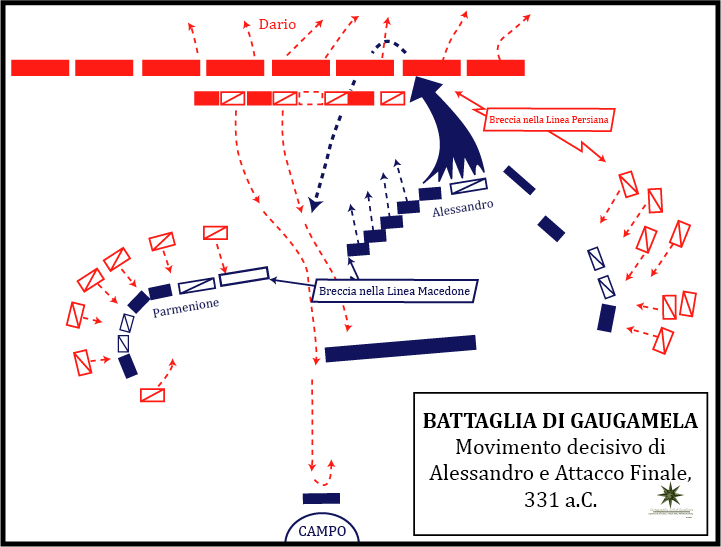 Movimento decisivo di Alessandro e attacco finale durante la battaglia di Gaugamela del 331 a.C.